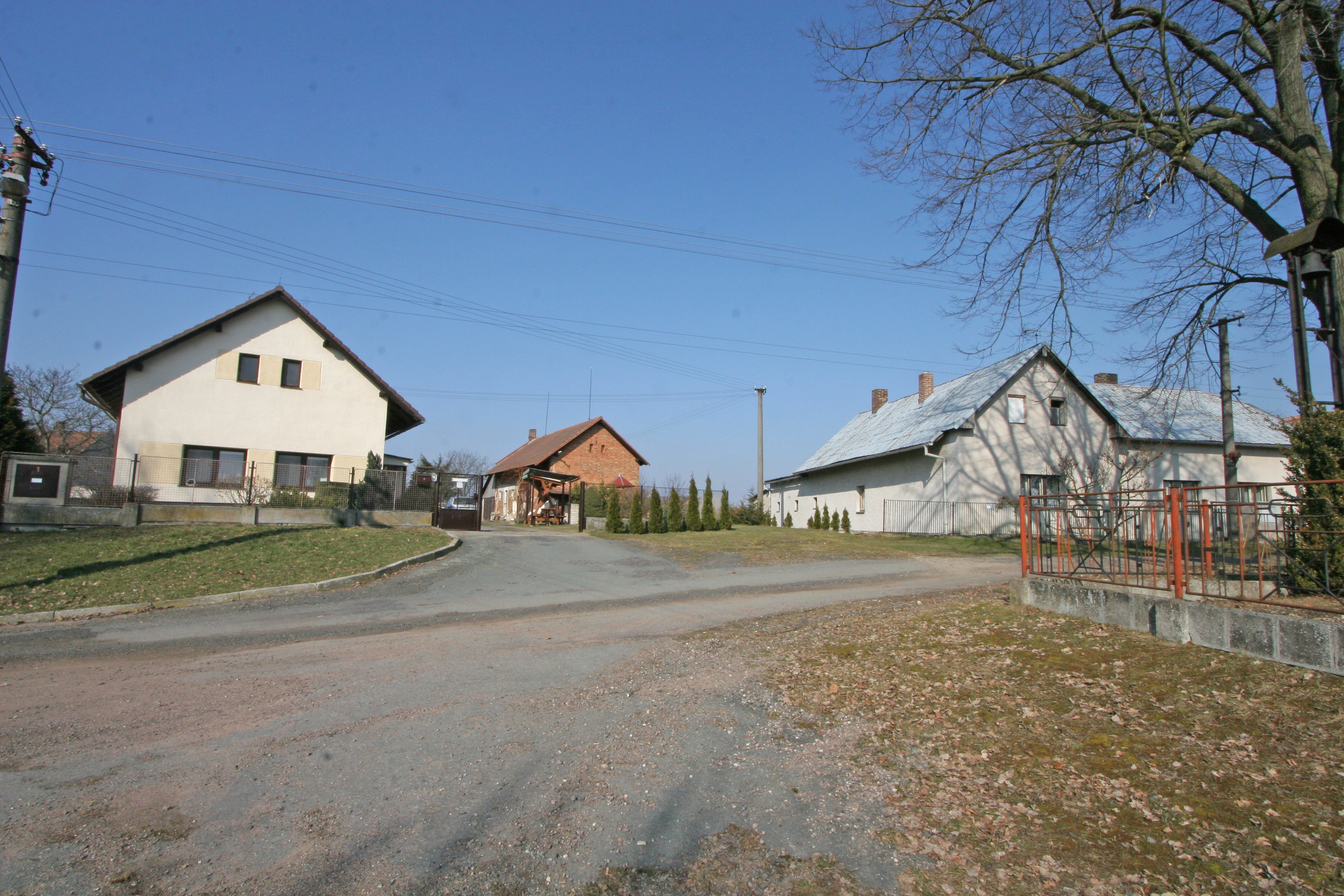 Kasalice čp. 1